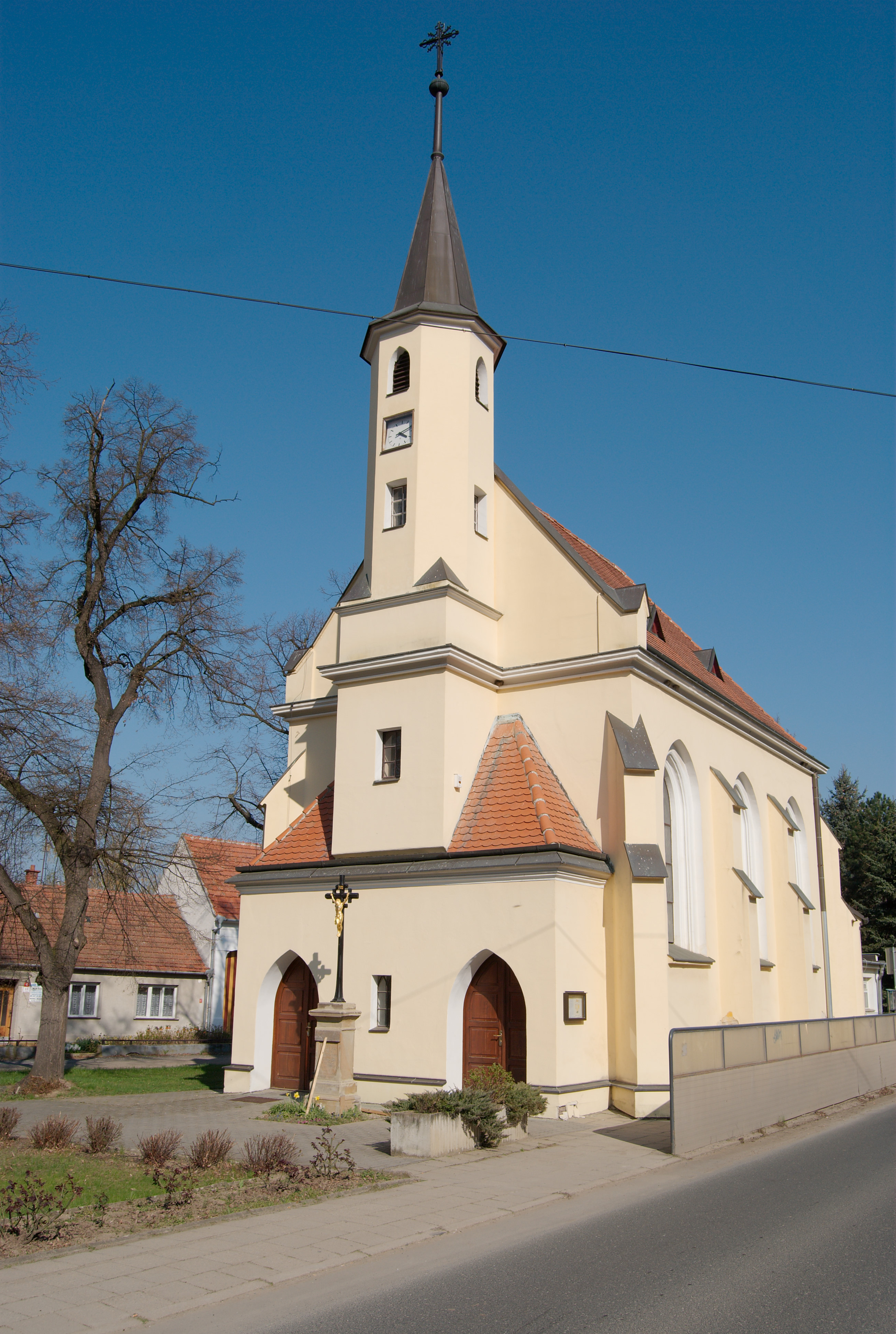 Ostopovice - Kaple svatého Jana Křtitele